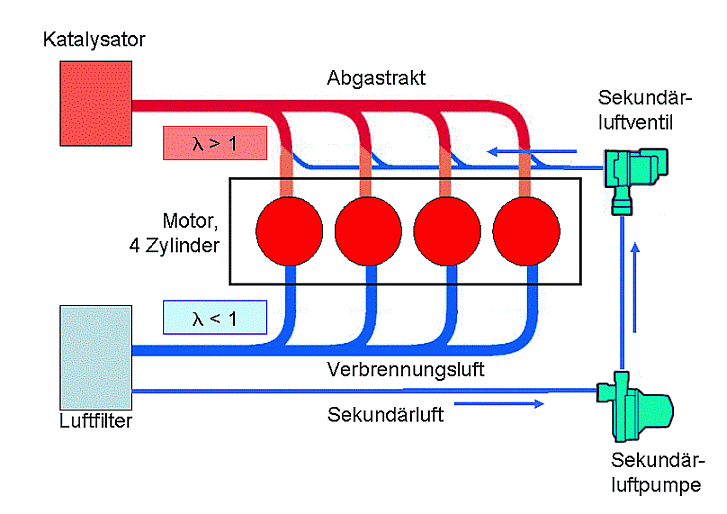 Eine schematische Darstellung des Sekundärluftsystems mit Verbrennungsluftzuführung (Luftfilter, Saugrohr), Abgastrakt (Abgaskrümmer, Katalysator) sowie dem eigentlichen Sekundärluftsystem mit Pumpe, Ventil und Zuleitungen.